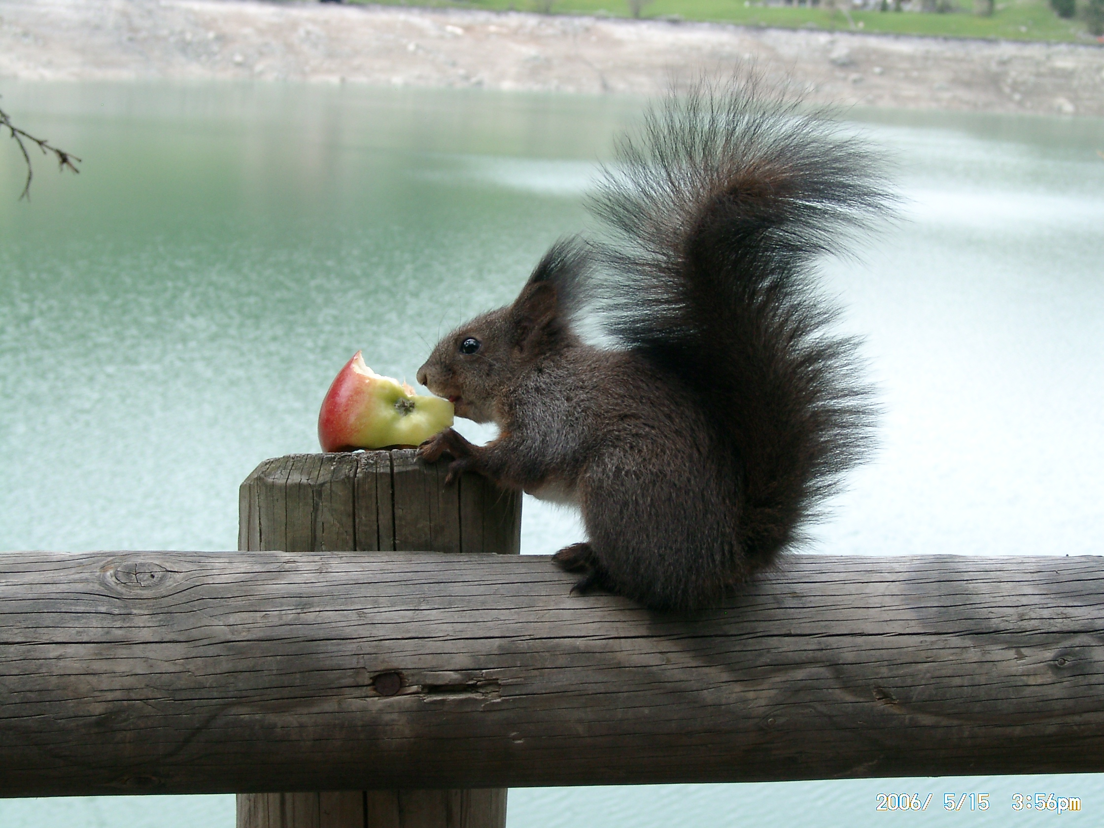 Eichhörnchen am Davoser See